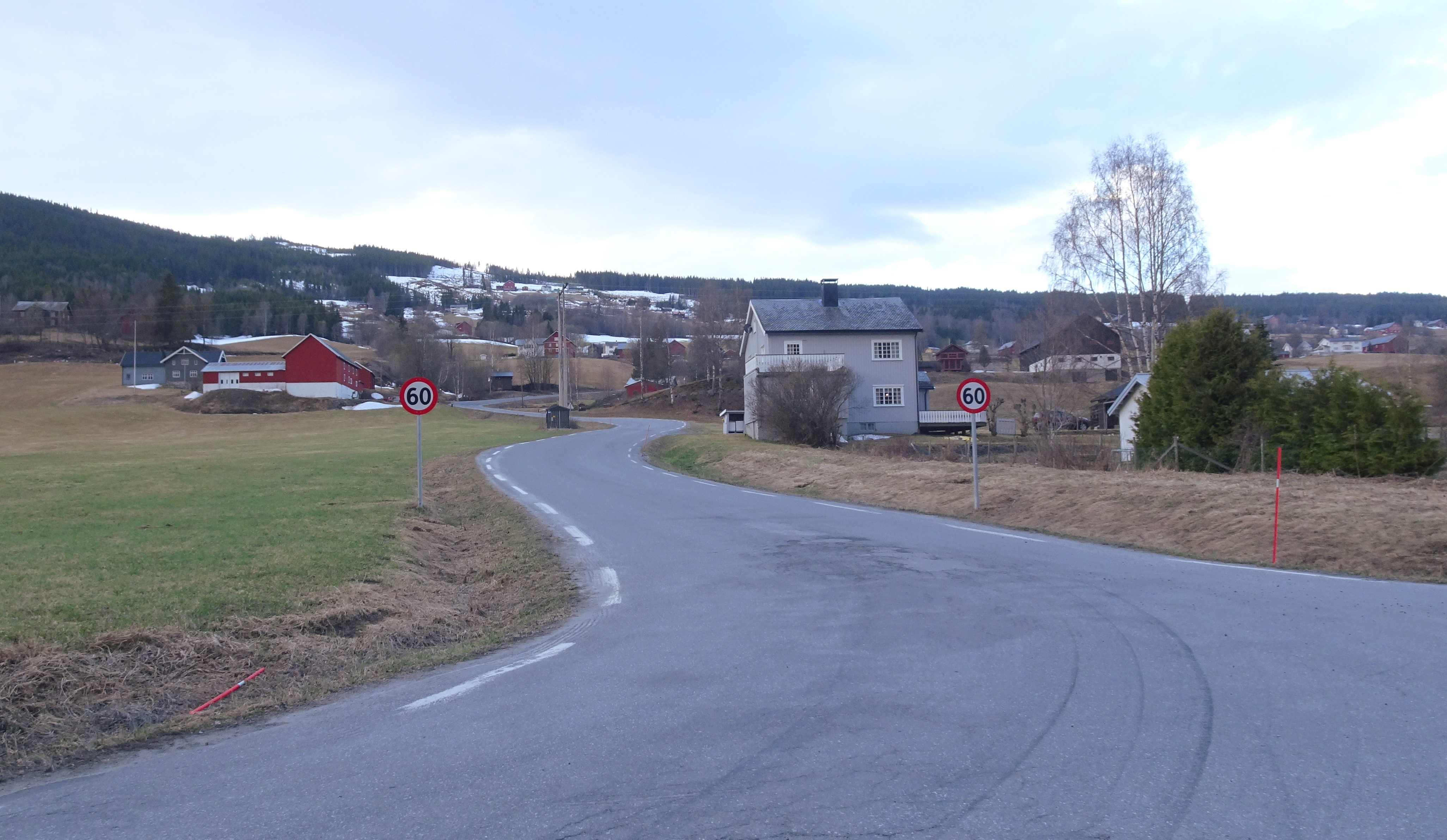 Nordøstenden av Mønavegen (fylkesvei 2478, tidl. 262)